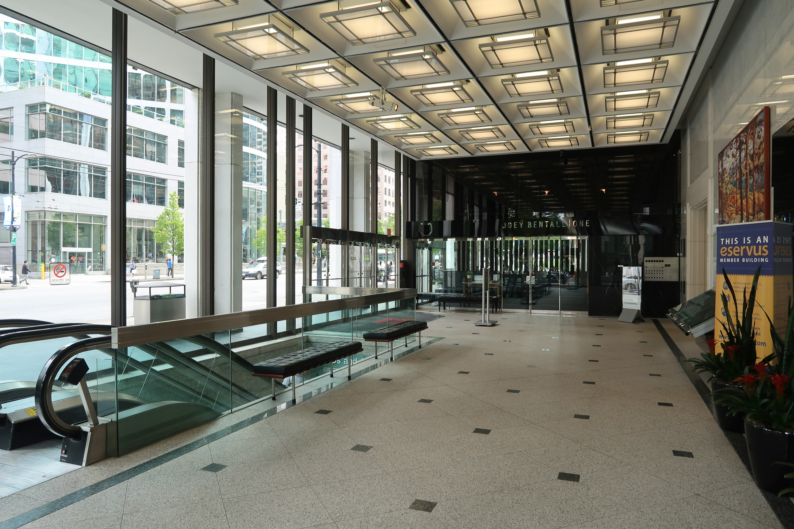 Bentall One Lobby